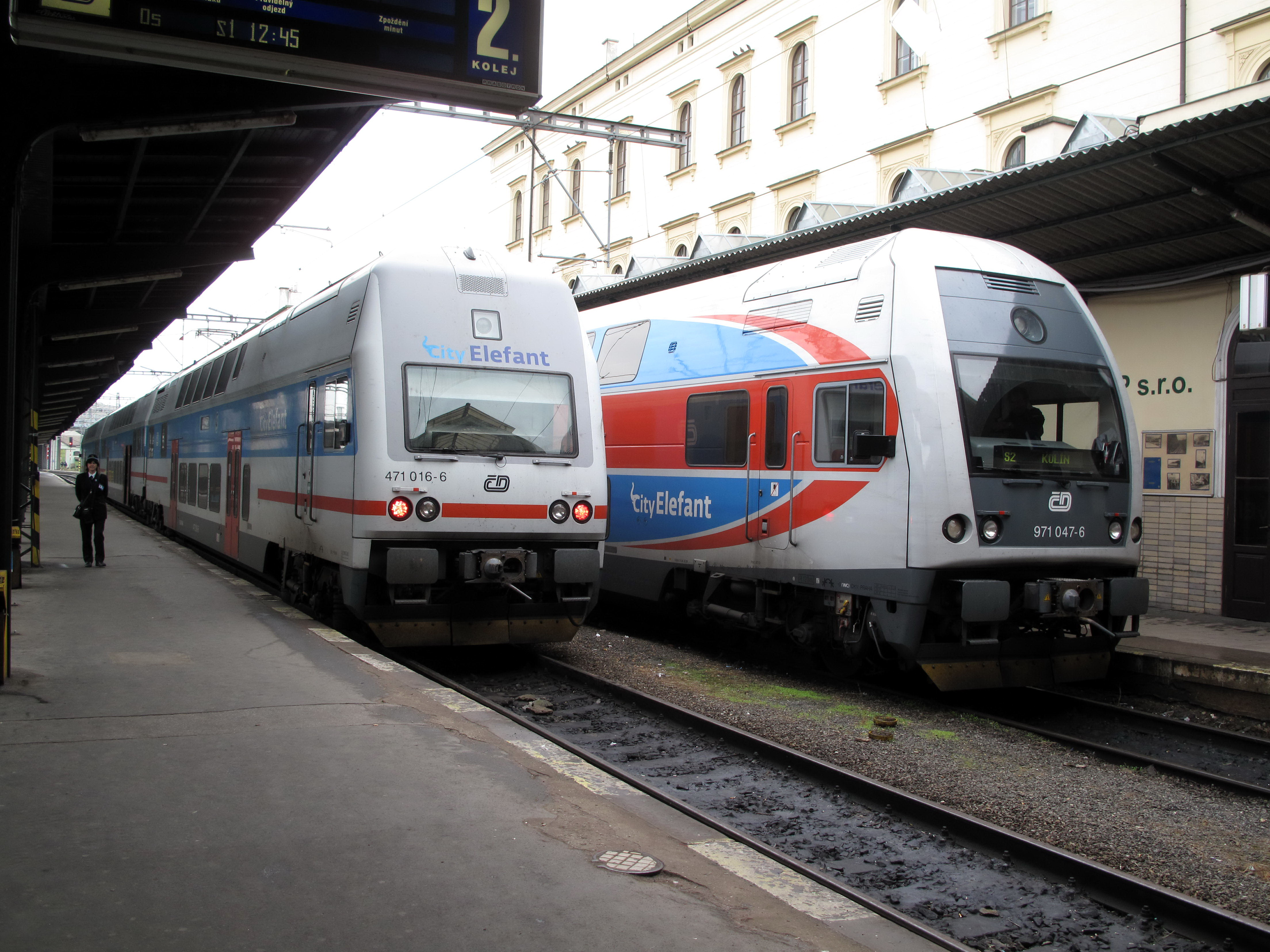 Elektrické jednotky na Masarykově nádraží